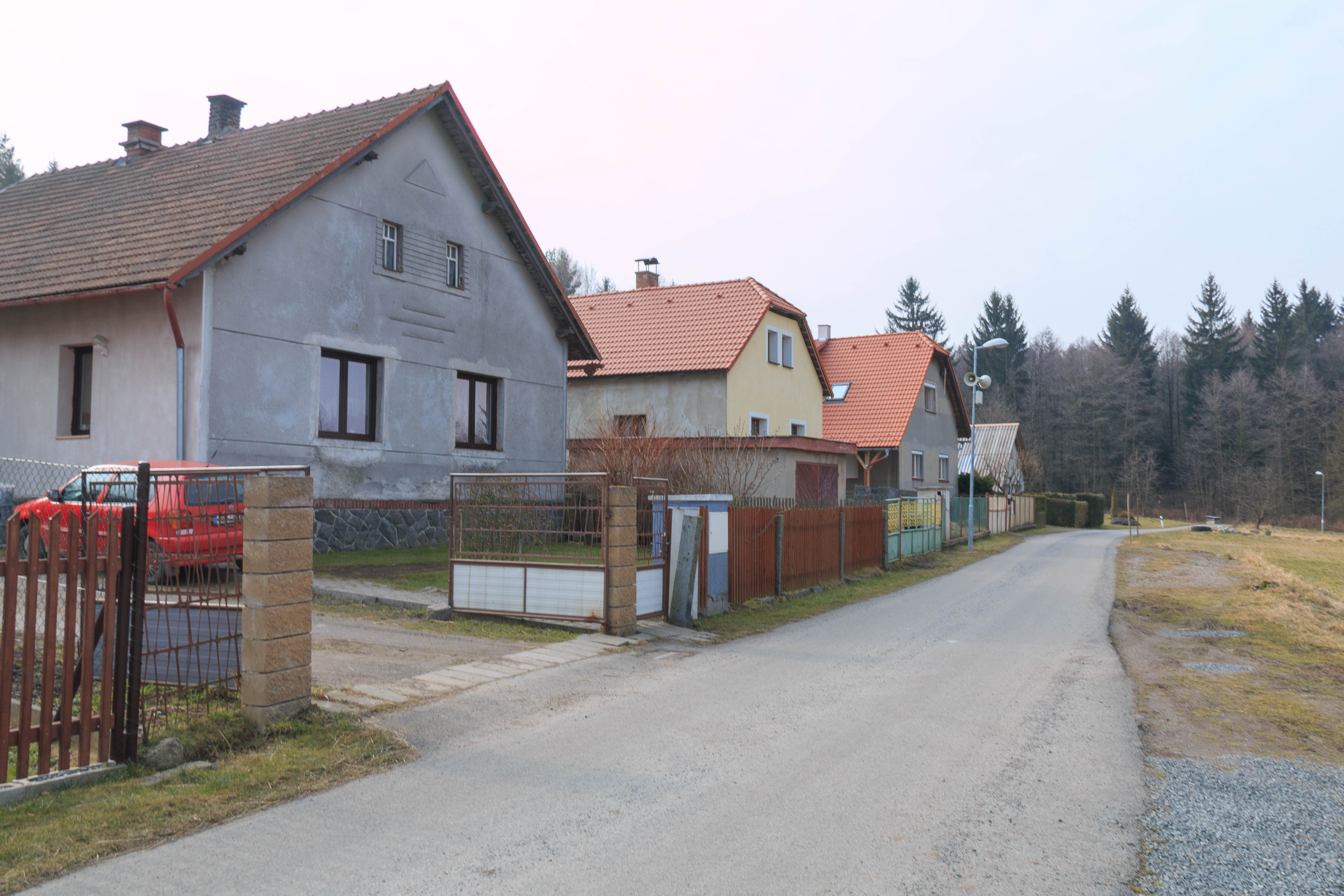 Krupínské paseky čp. 37